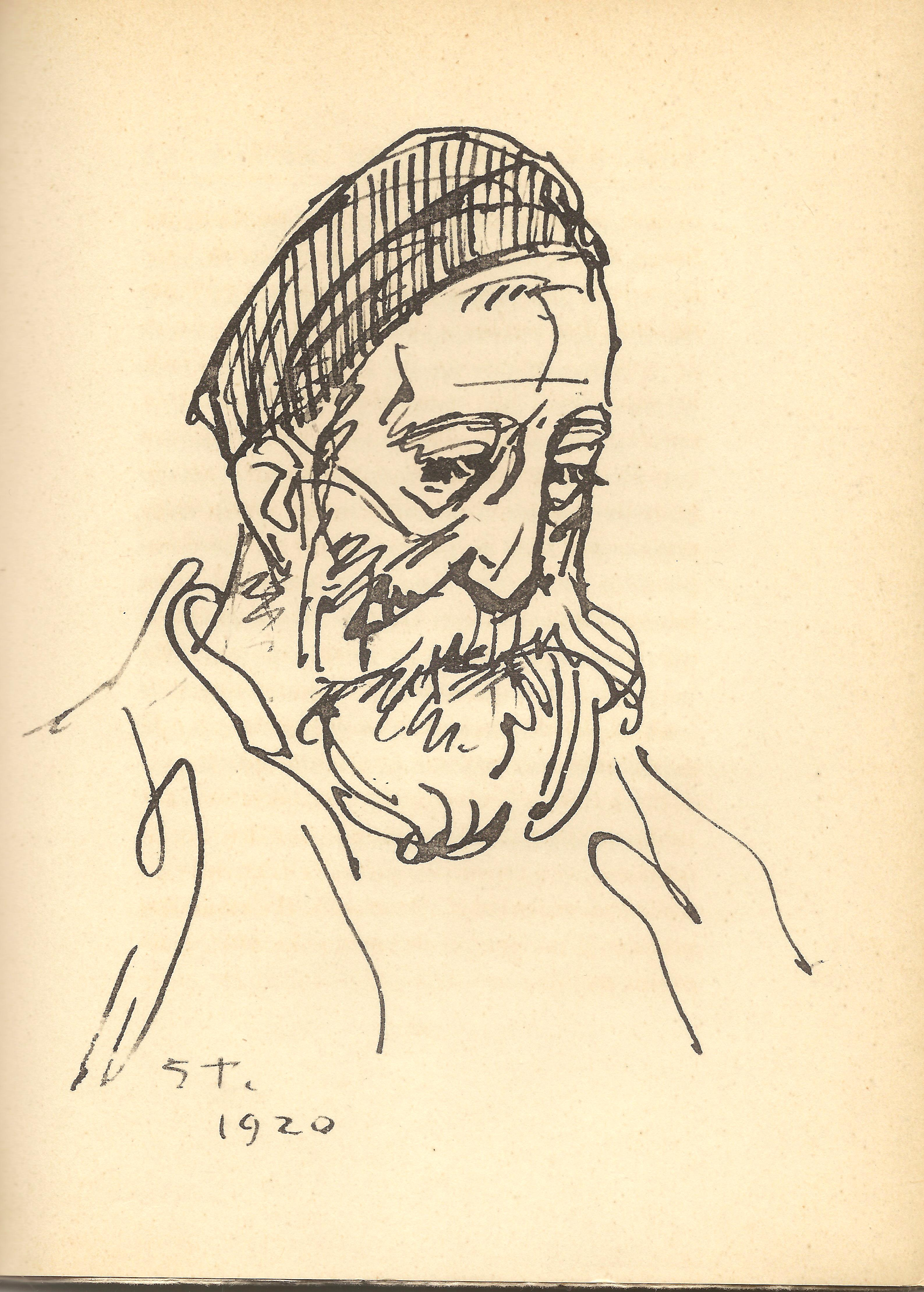 Portrait d'Anatole France par Théophile Alexandre Steinlen (1859-1923) illustrant un livre de Claude Aveline, Les Muses mêlées", publié en 1926